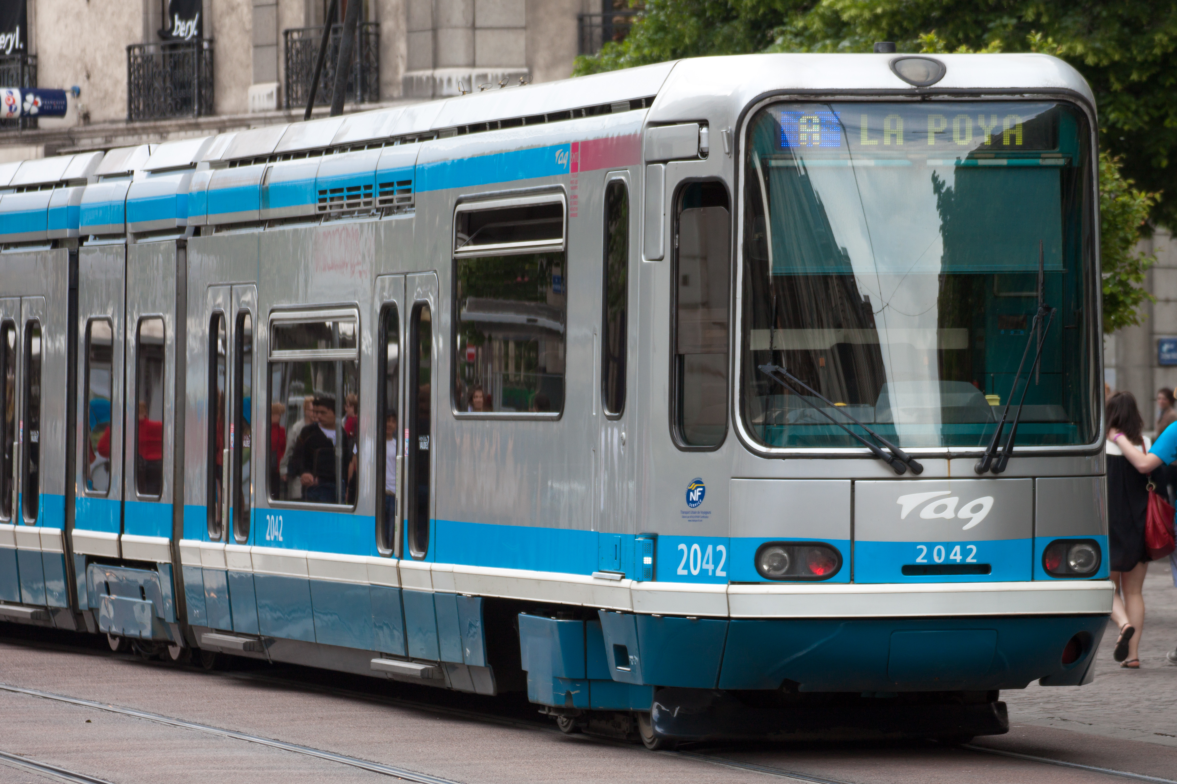 TFS 2042 de la TAG à l'arrêt Victor Hugo.